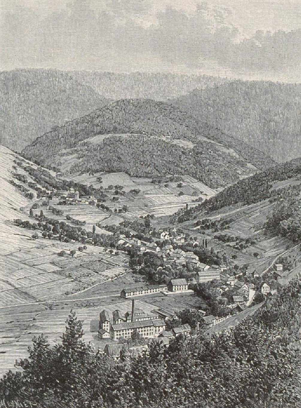 Echery et le Brézouard.